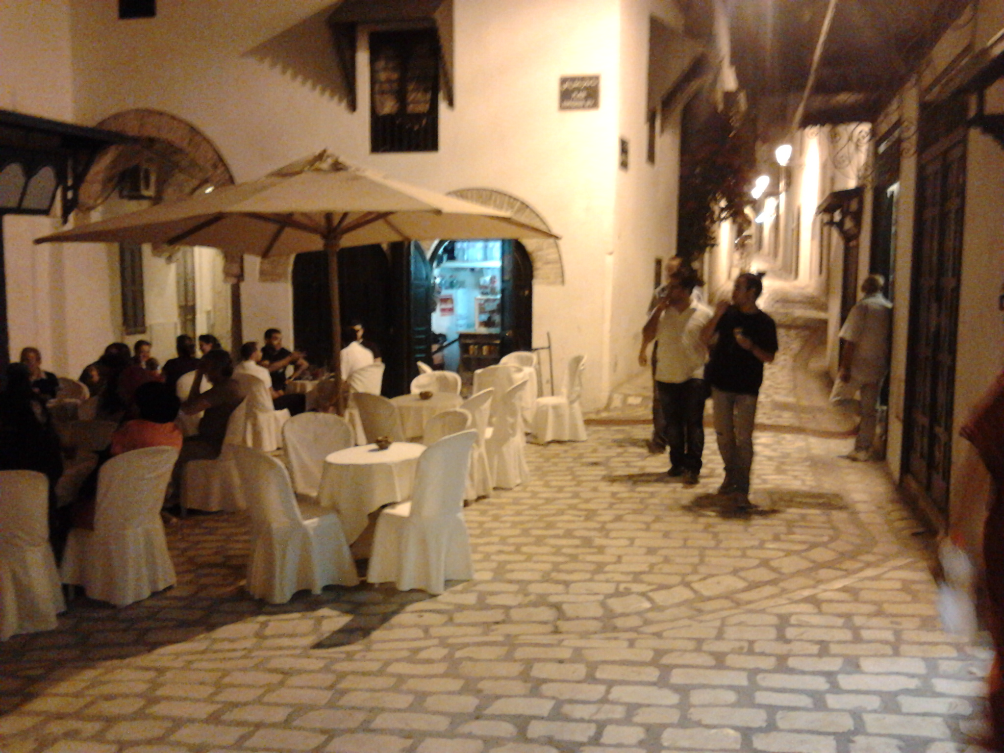 Place Romdhane bey - Maison d'El Jouini (Ex maison (palais) de Romdhane Bey (Mouradite 1696 -1699) - Médina de Tunis - Médina de Tunis